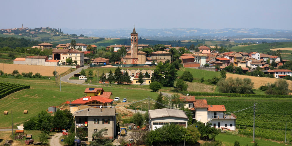 Panorama di Montale Celli, frazione di Costa Vescovato (AL)